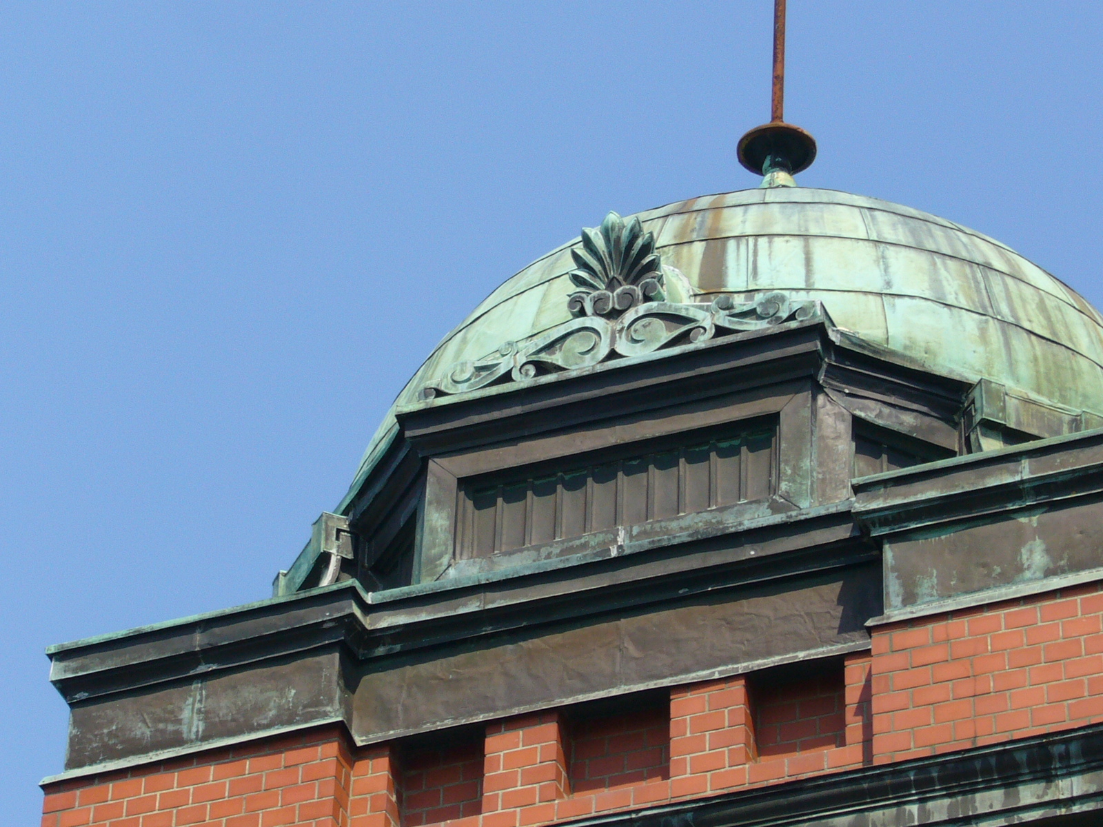 sawara-mitsubishikan-dome,katori-city,japan